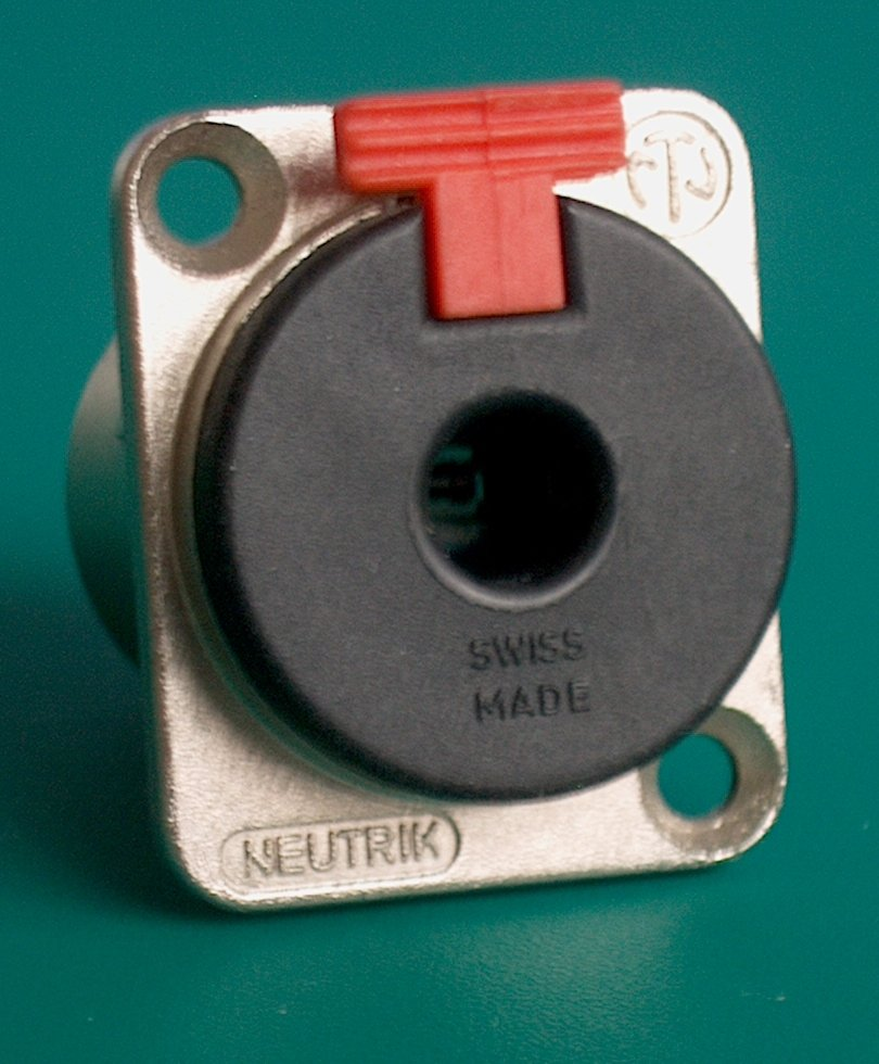 Klinkenbuchse 6,35mm mit Verriegelung der Firma Neutrik